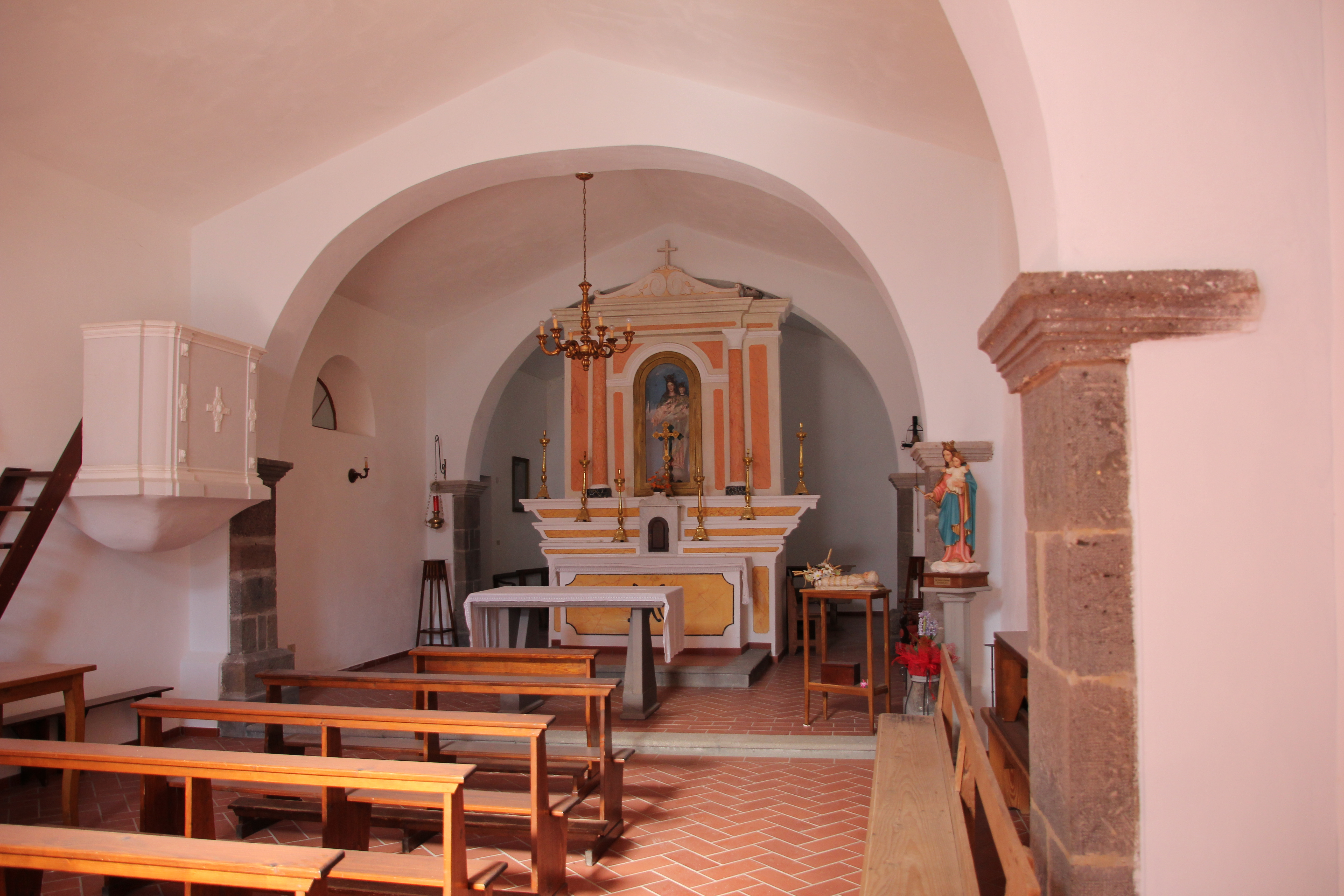 Ghilarza, chiesa di Santa Maria Ausiliatrice di Trempu